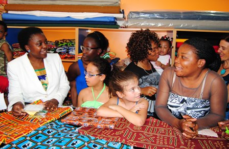 Ministro Kyenge a NeWope